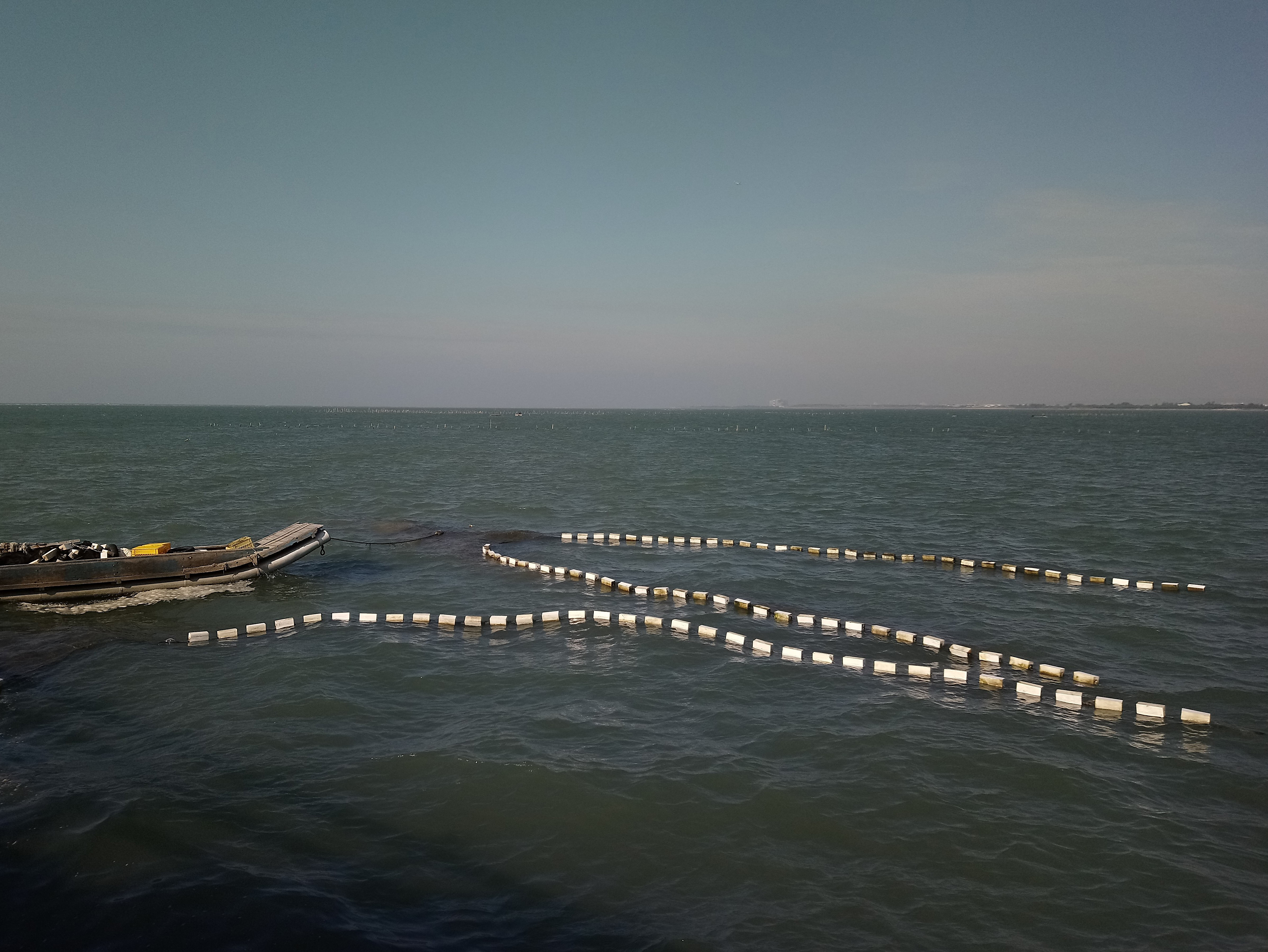 海山漁港內定置網,台灣省新竹市香山區香山聯里朝山里